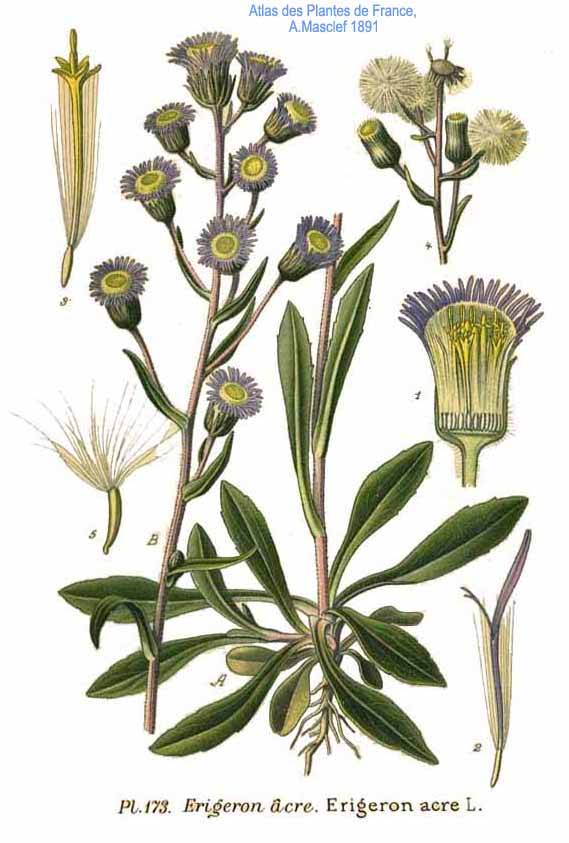 Erigeron acre L.